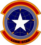 221st_Combat_Communications_Squadron emblem